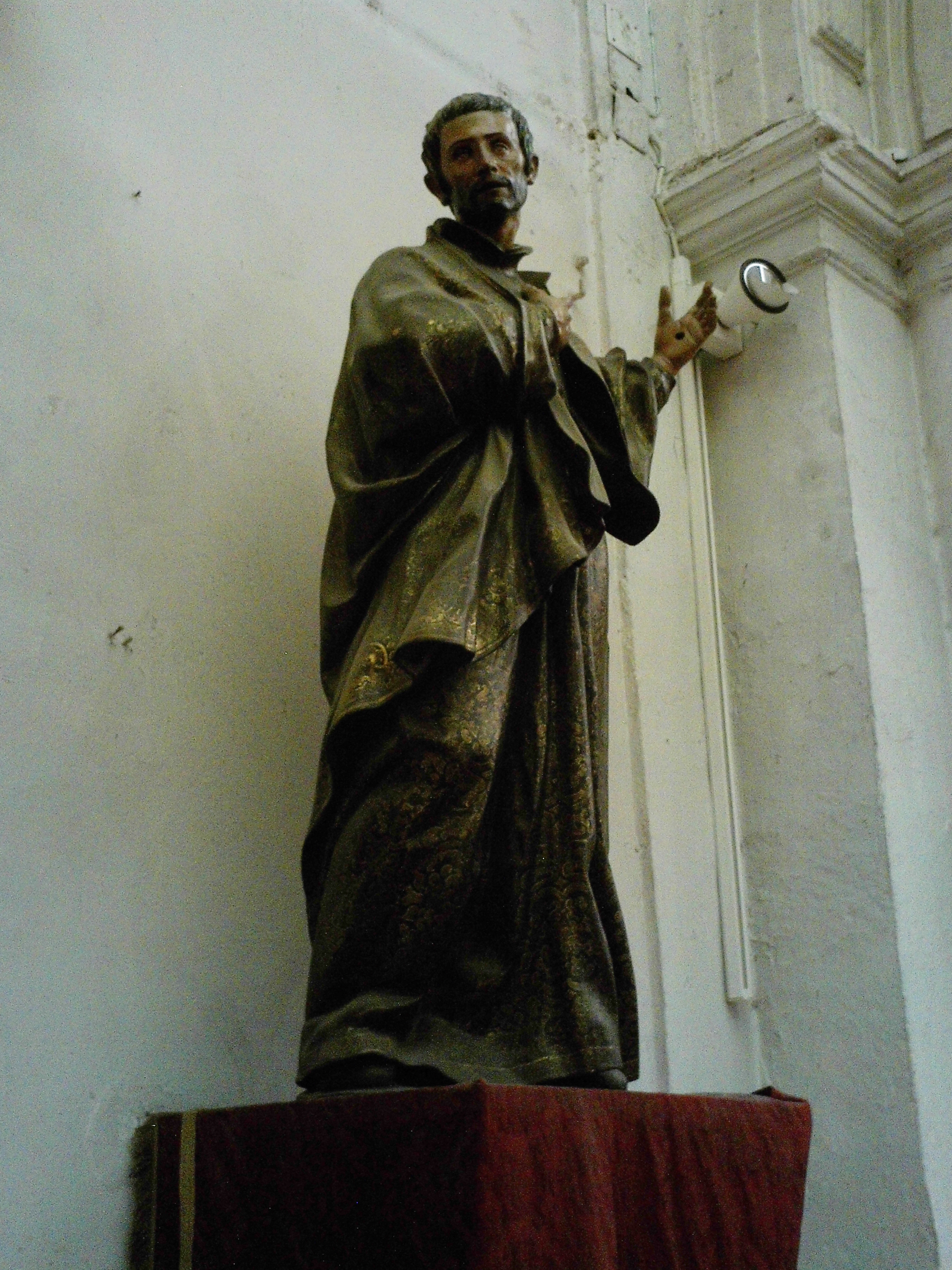 San Juan de Goto (Juan de Soan de Gotó). Siglo XVII. Iglesia de la Anunciación, Sevilla, Andalucía, España.